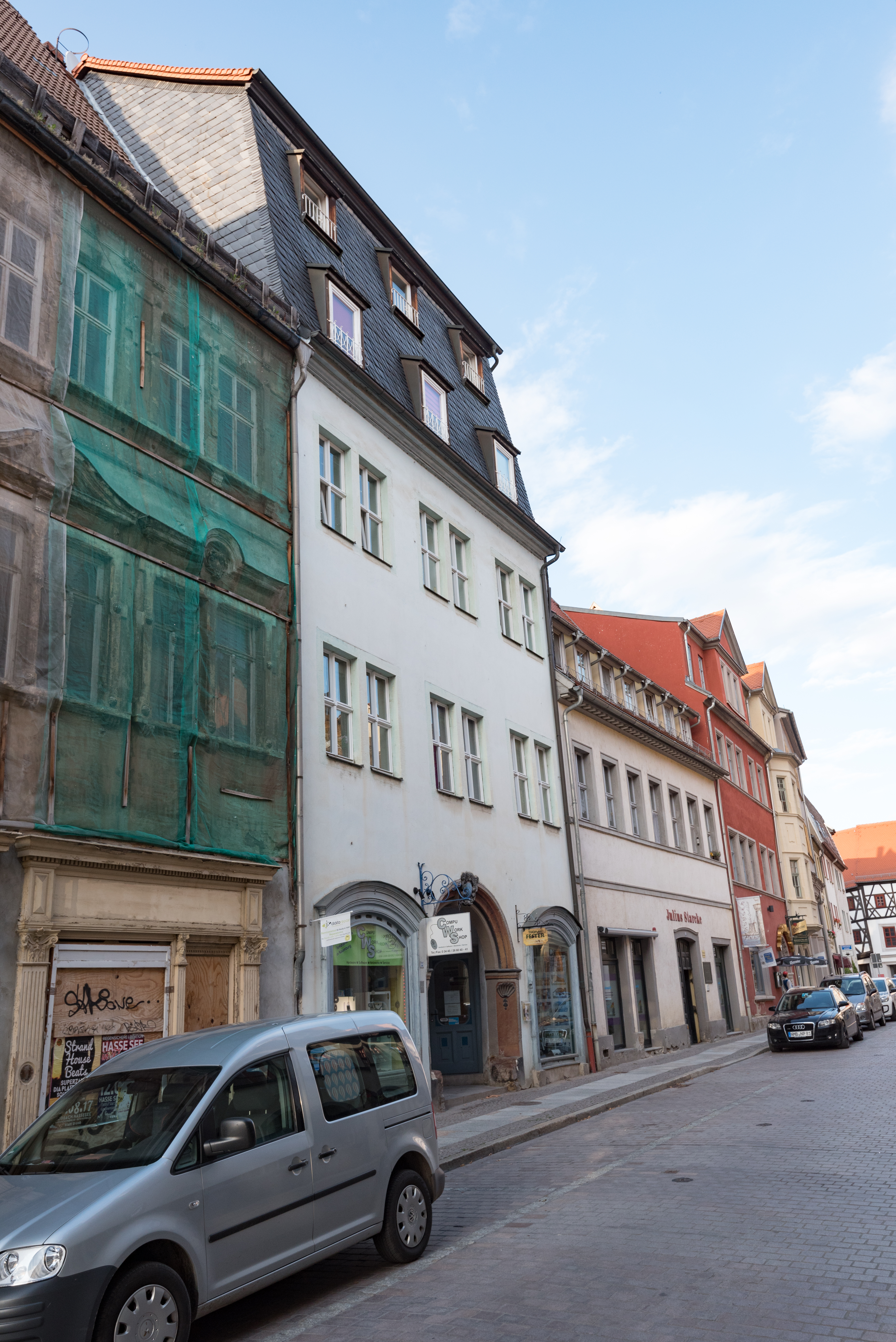 Naumburg (Saale), Marienstraße 37